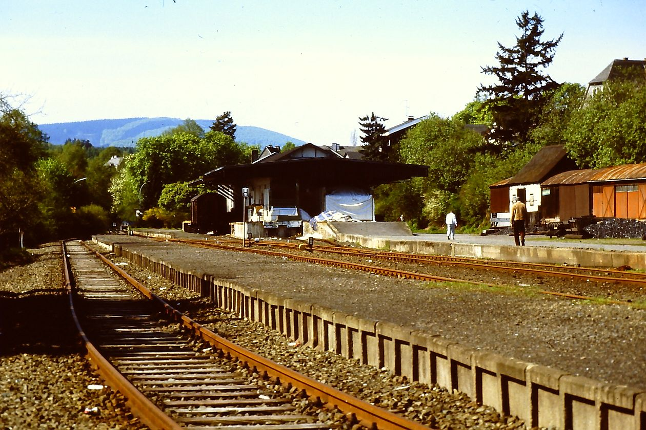 Bahnhof Schmallenberg am 17.5.1986